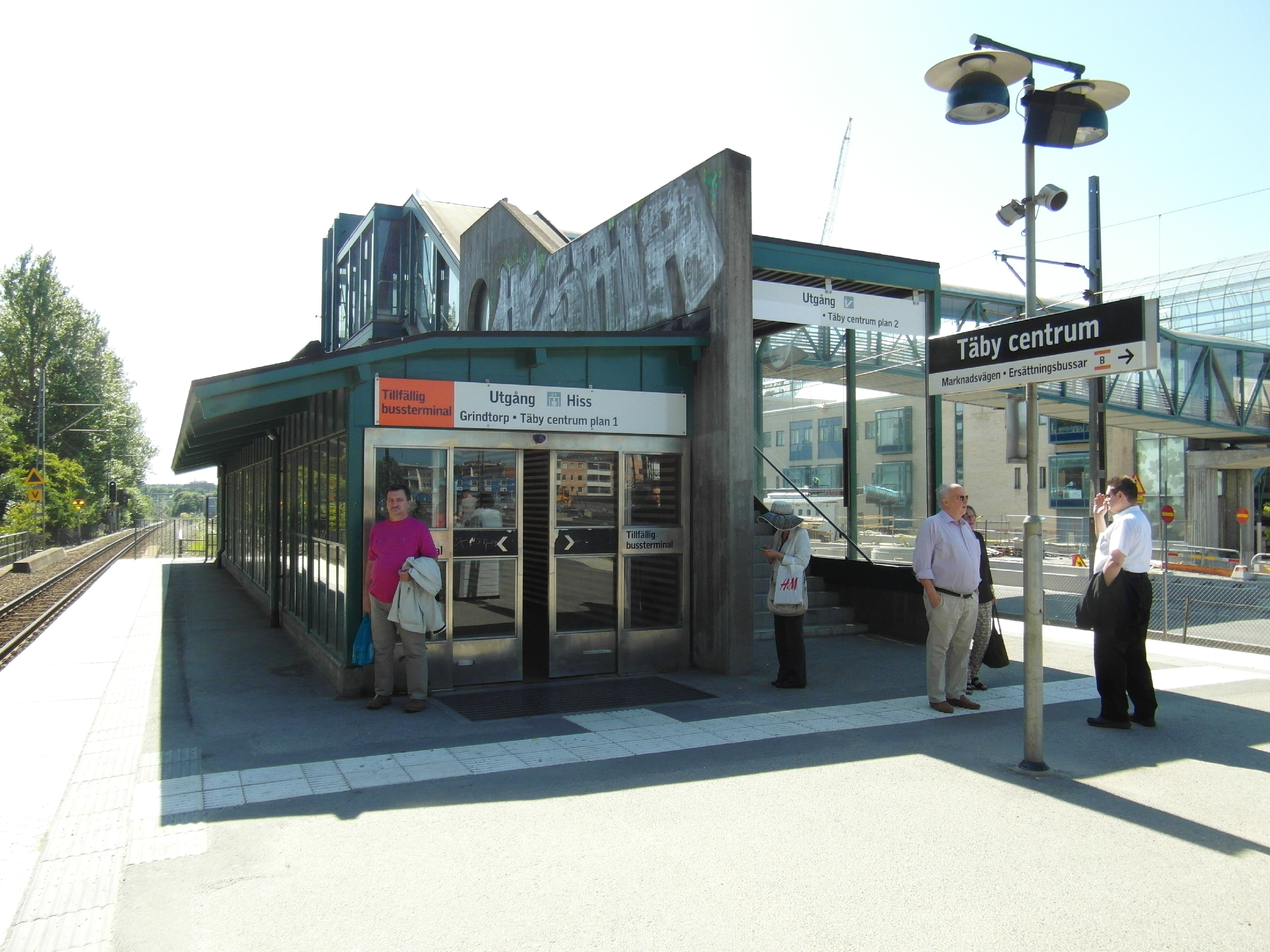 L28